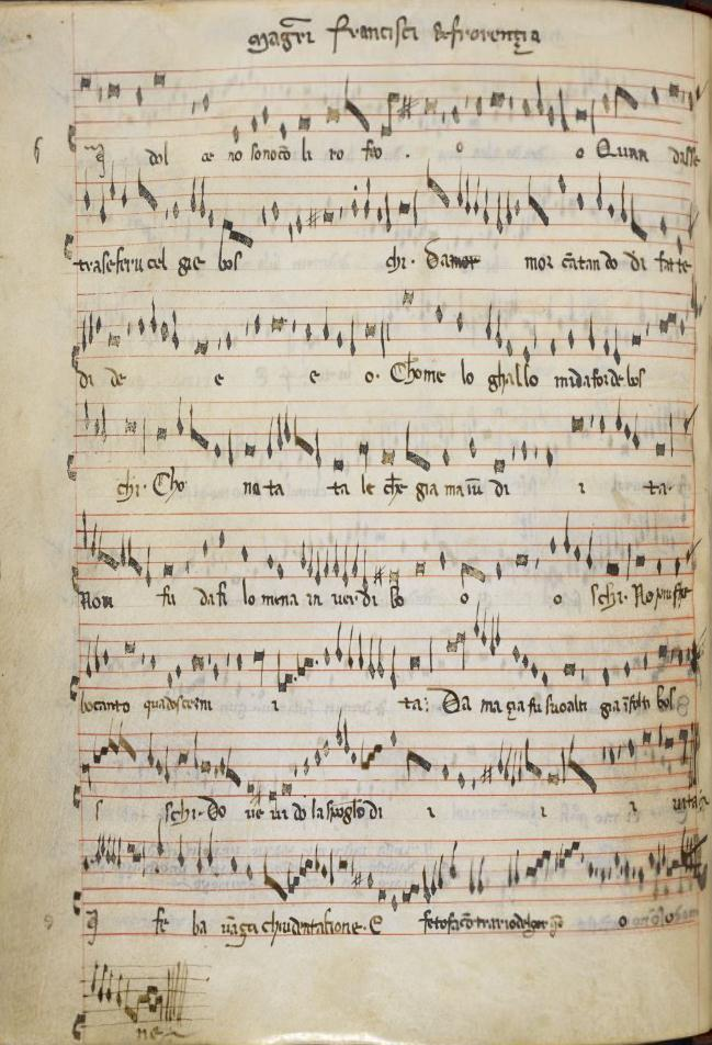 London, British Library, Additional 29987